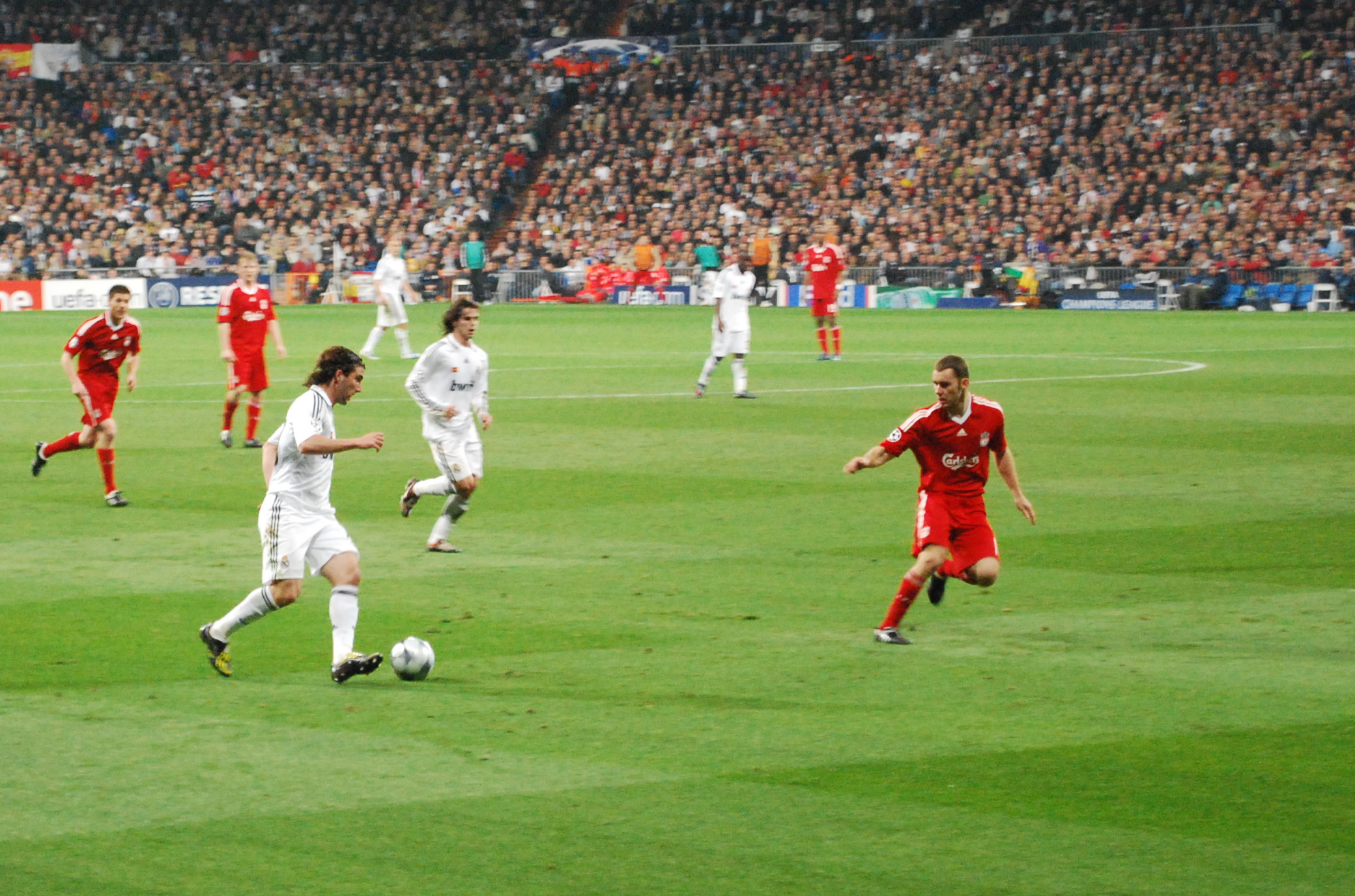 Fabio Aurelio, 2009, Real Madrid - Liverpool (Champions League)